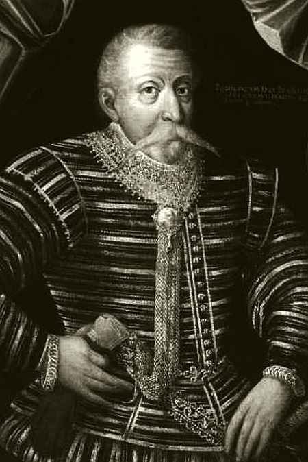 Bogislaw XIII. (1544-1606]), Herzog von Pommern-Barth-Rügen Książę pomorski Bogusław XIII